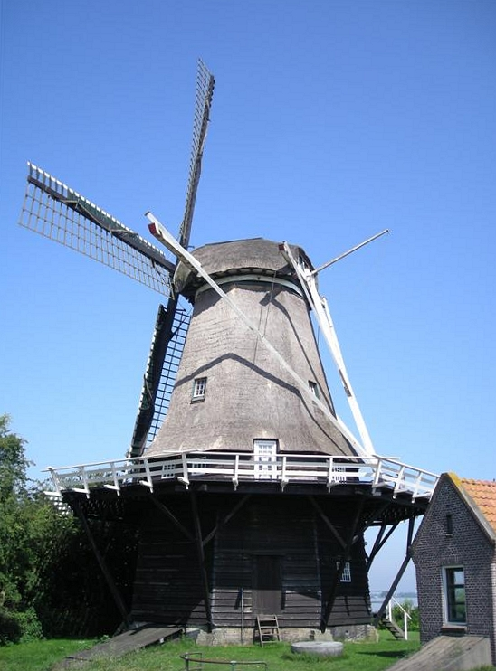 Sweachmermolen of Langweerder molen tussen Langweer en Boornzwaag